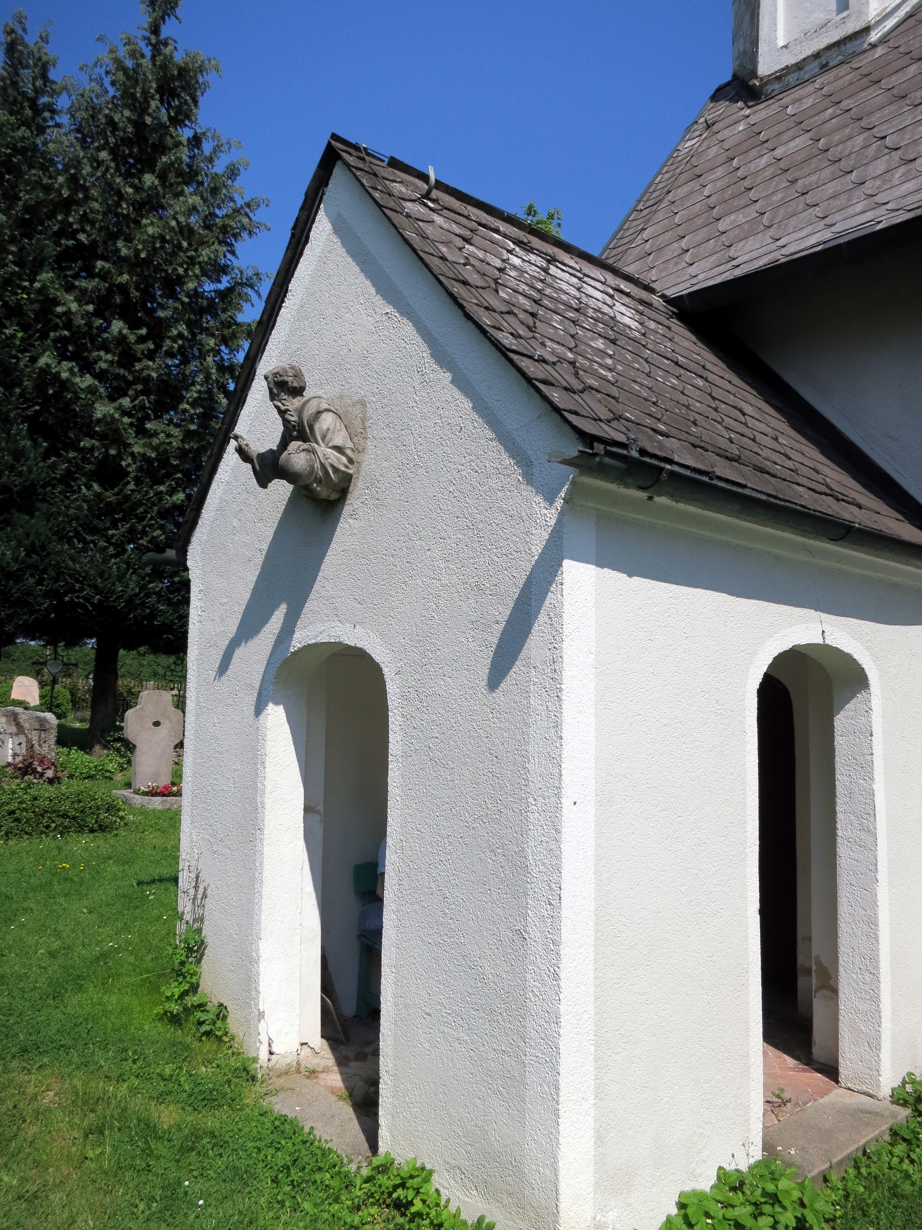 Der Vorbau an der Filialkirche St. Peter und Paul am Gut Rieden in Starnberg